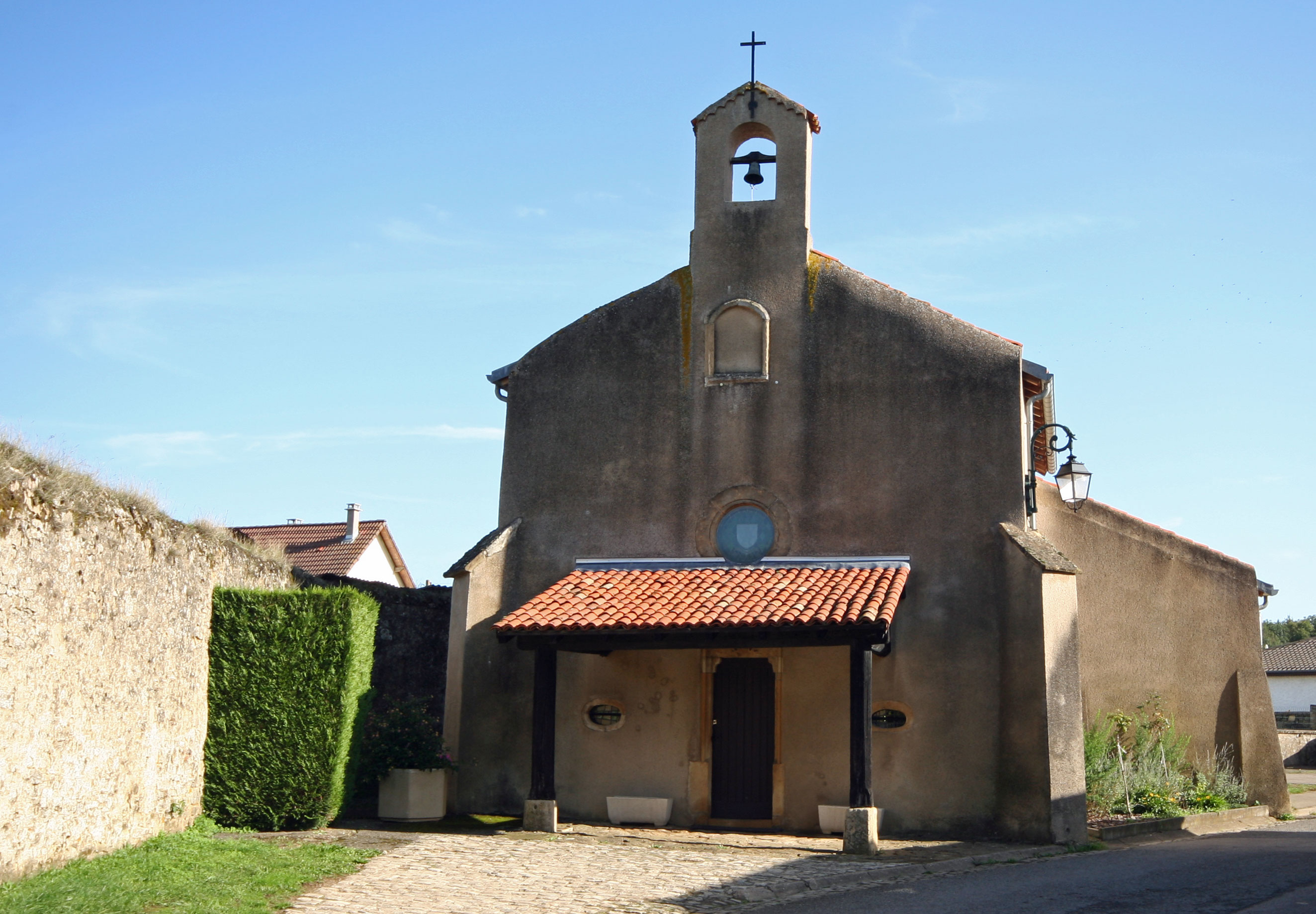 Klackegiewel zu Buerg-Rëttgen.